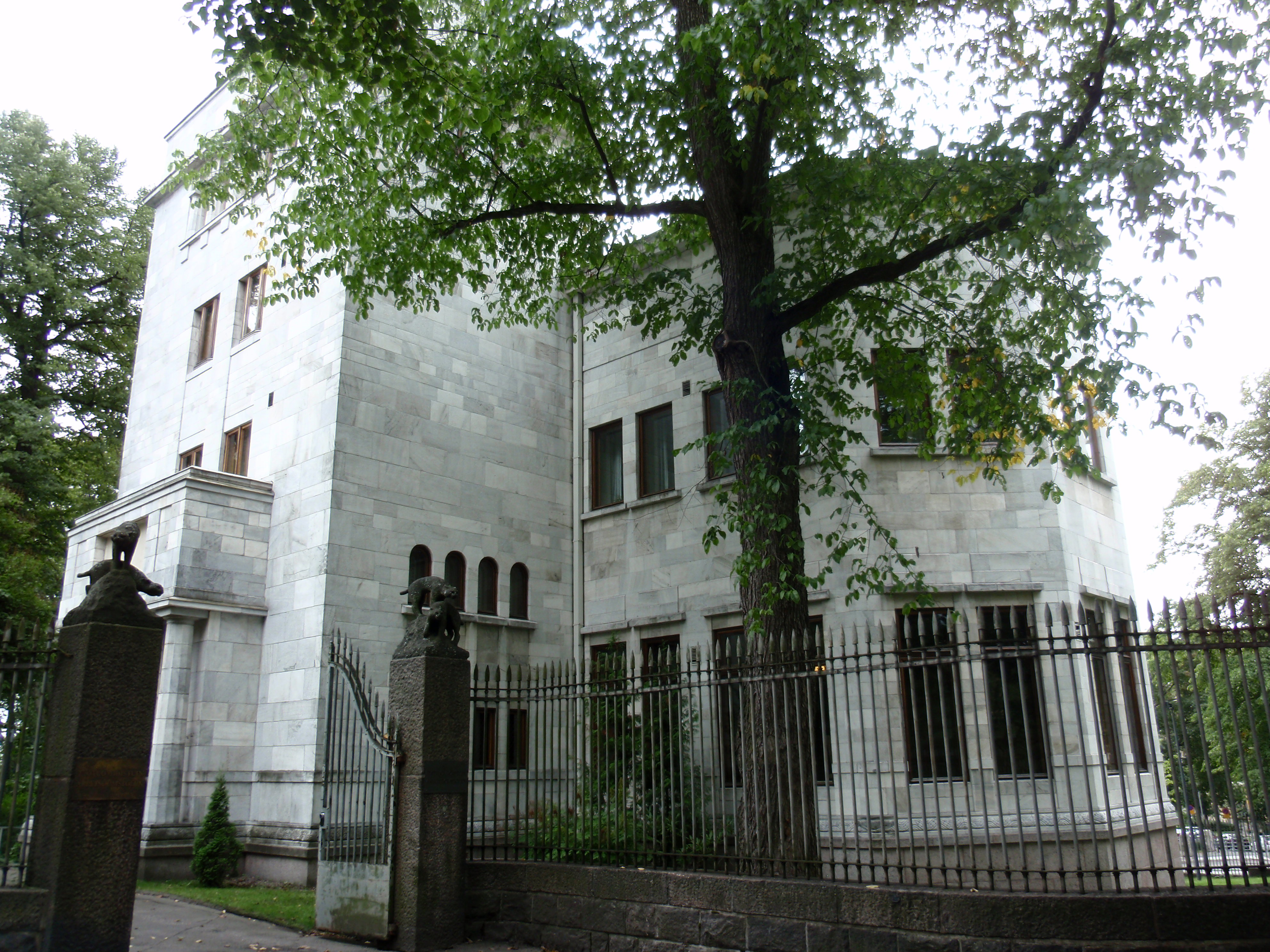 Marmoripalatsi Helsingin Kaivopuistossa